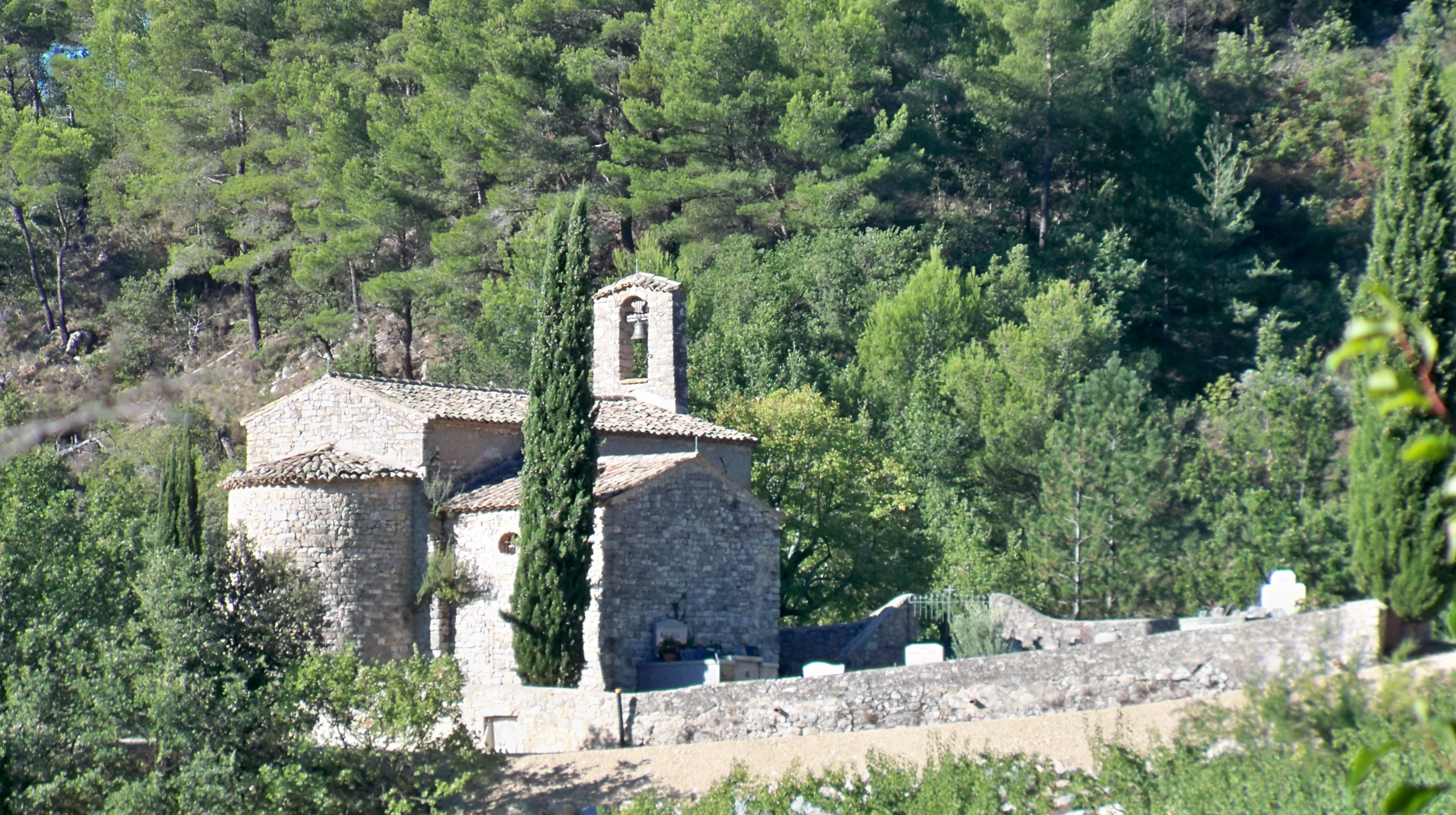 Chapelle Notre-Dame, (Inscription, 1983) .